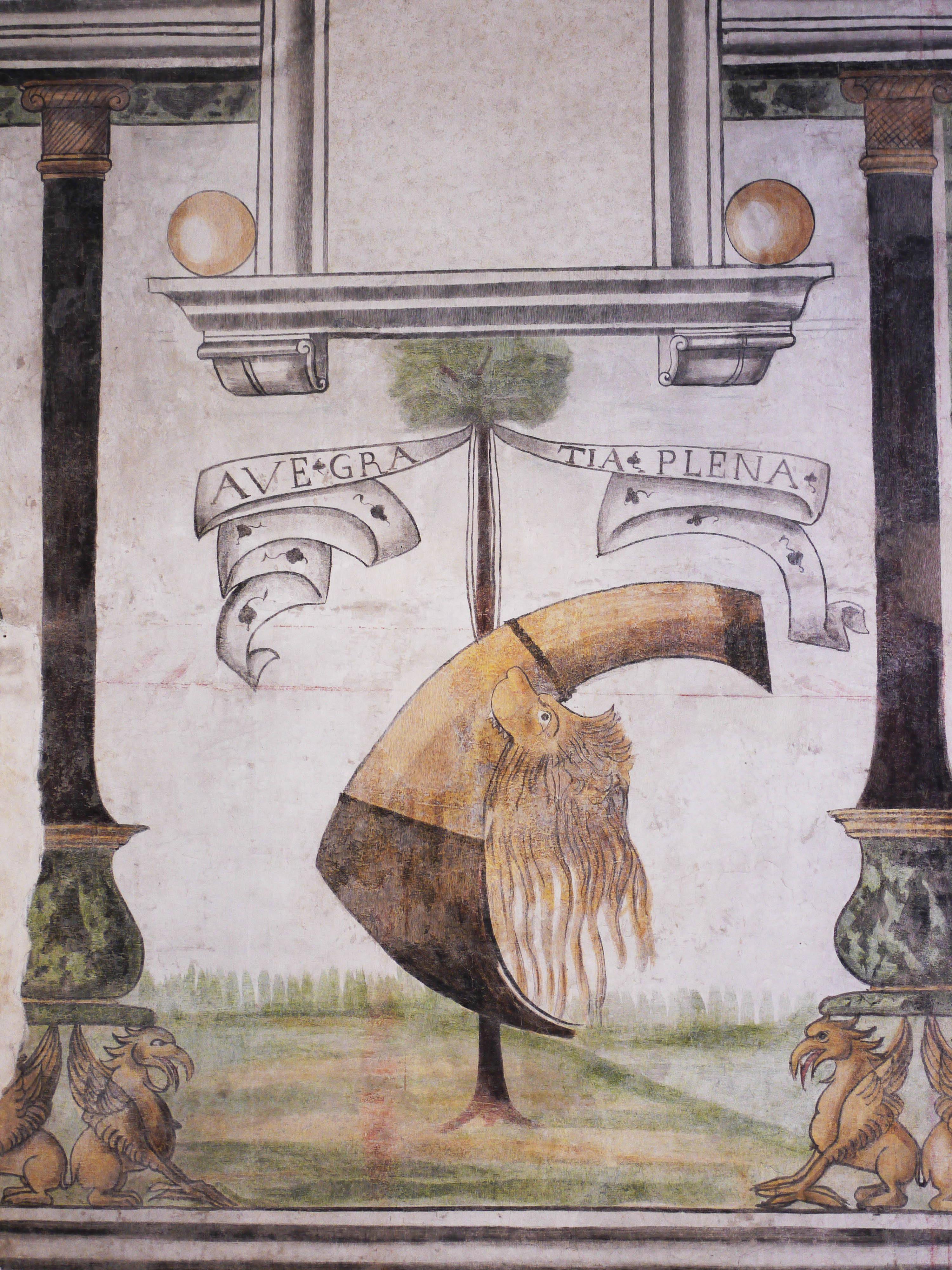 Ca' Cappello (XV sec), Affresco "Ave Maria Gratia Plena" - Meolo (VE)